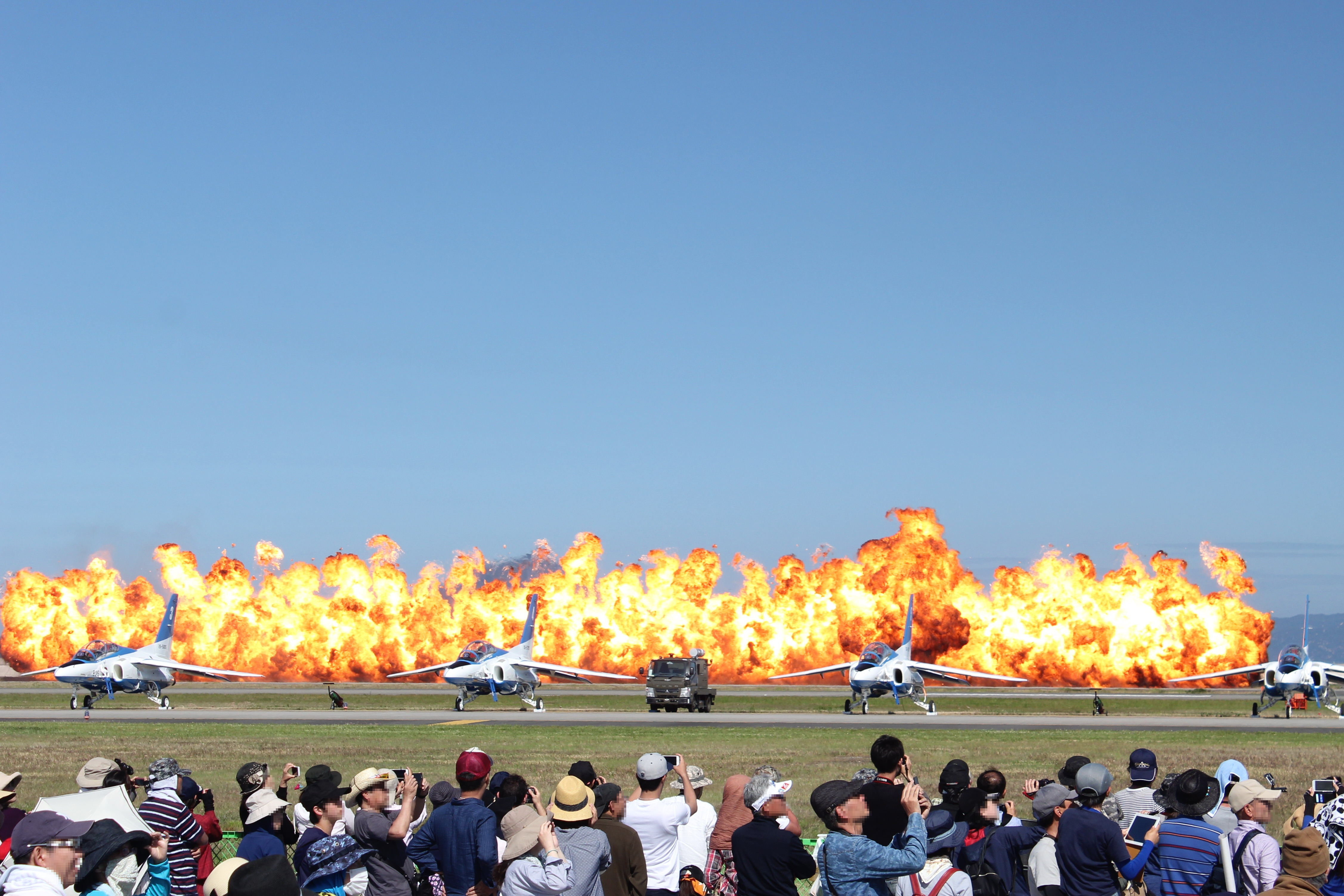 岩国基地 フレンドシップデー2017で行われた近接航空支援における模擬爆弾イメージ